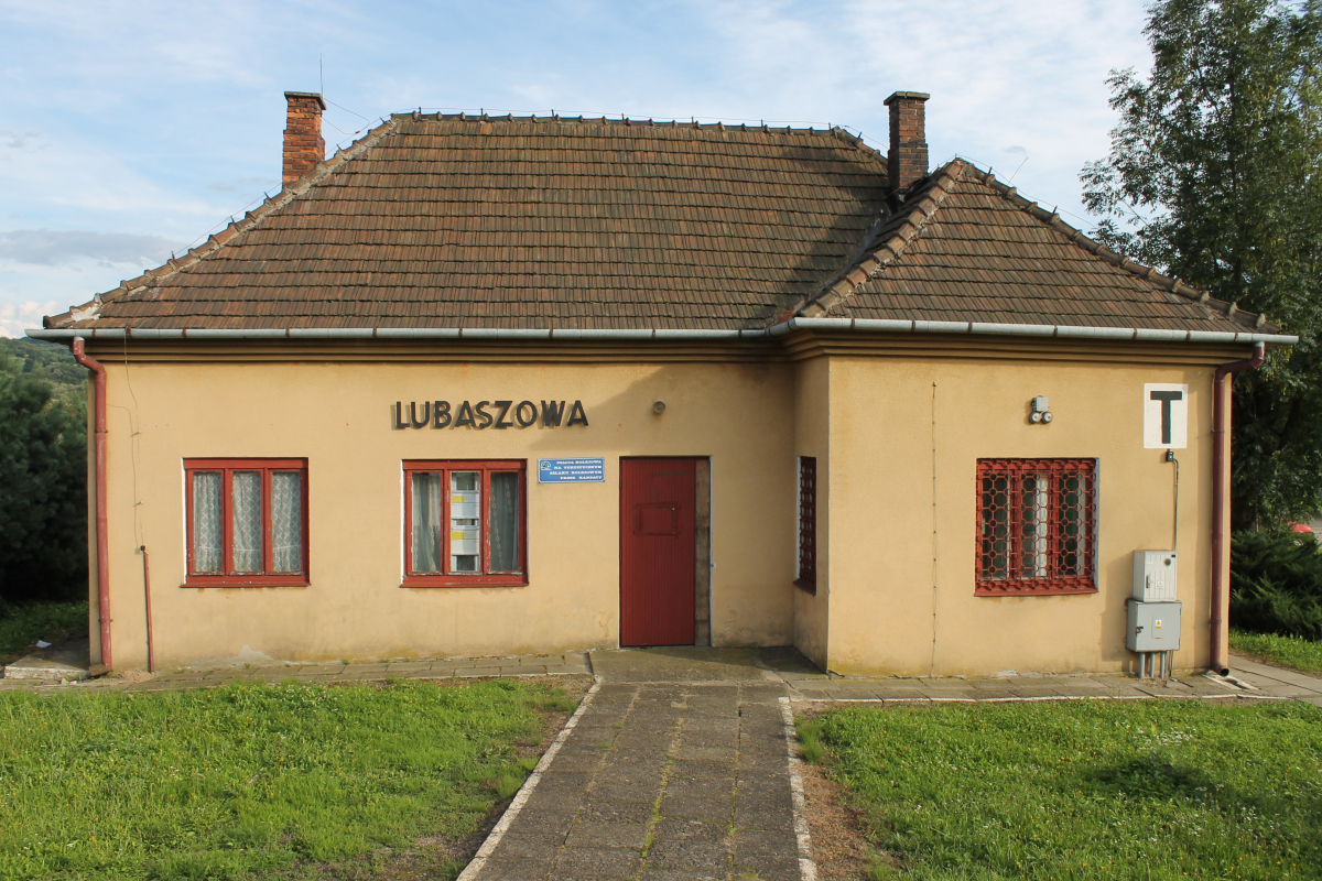 Budynek przystanku Lubaszowa. This photo was taken during Railway Wikiexpedition 2014 set up by Wikimedia Polska Association in cooperation with Fundacja Grupy PKP. You can see all photographs in category Wikiekspedycja kolejowa 2014.